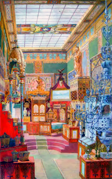 Ескіз павільйону для всесвітньої виставки у Парижі (1900)